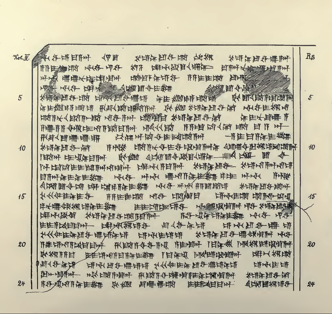 List Tuszratty do Amenhotepa III w języku huryckim – autografia.